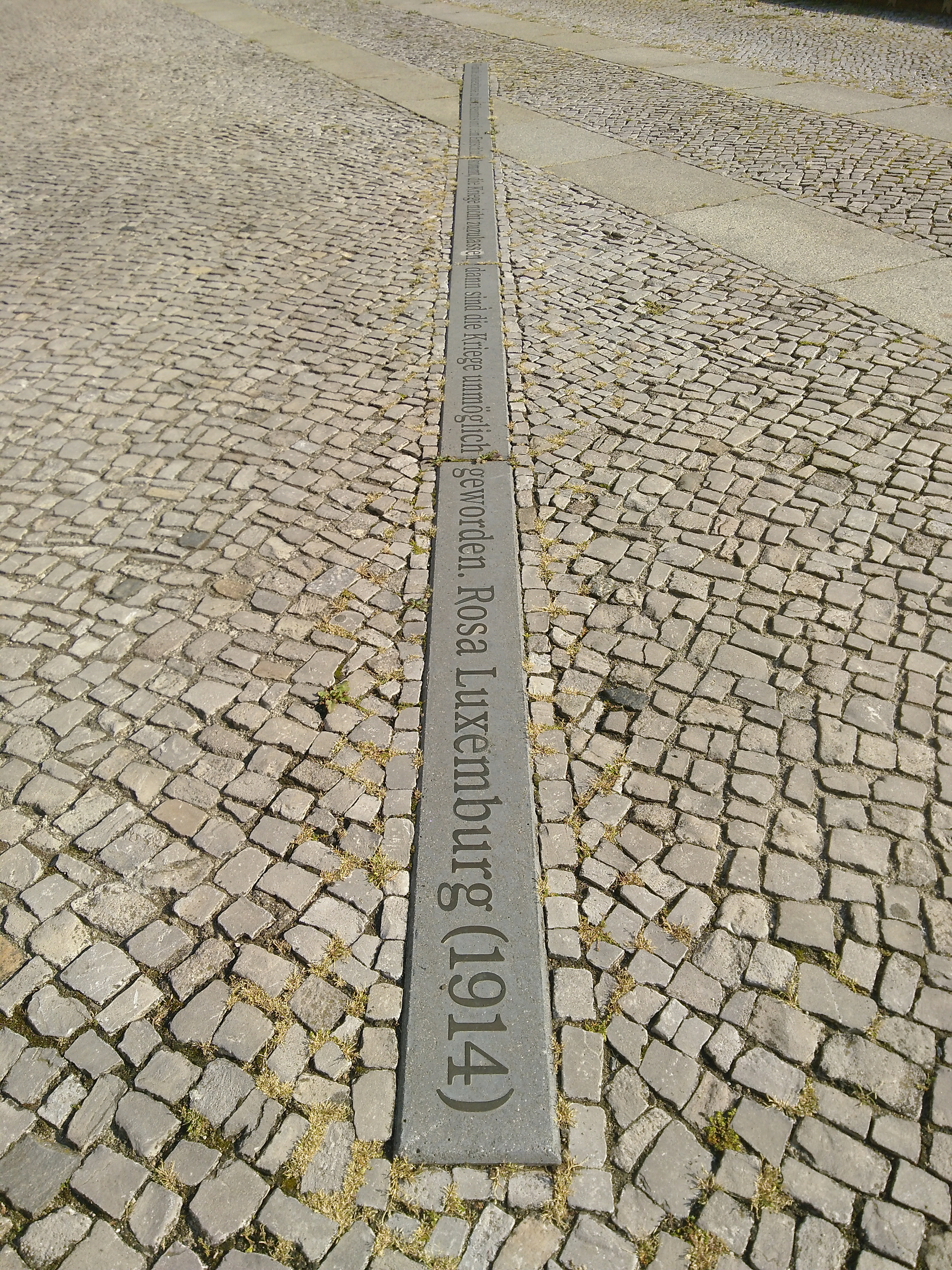 Element des Rosa-Luxemburg-Denkmals von Hans Haacke am Rosa-Luxemburg-Platz, Berlin (2019)